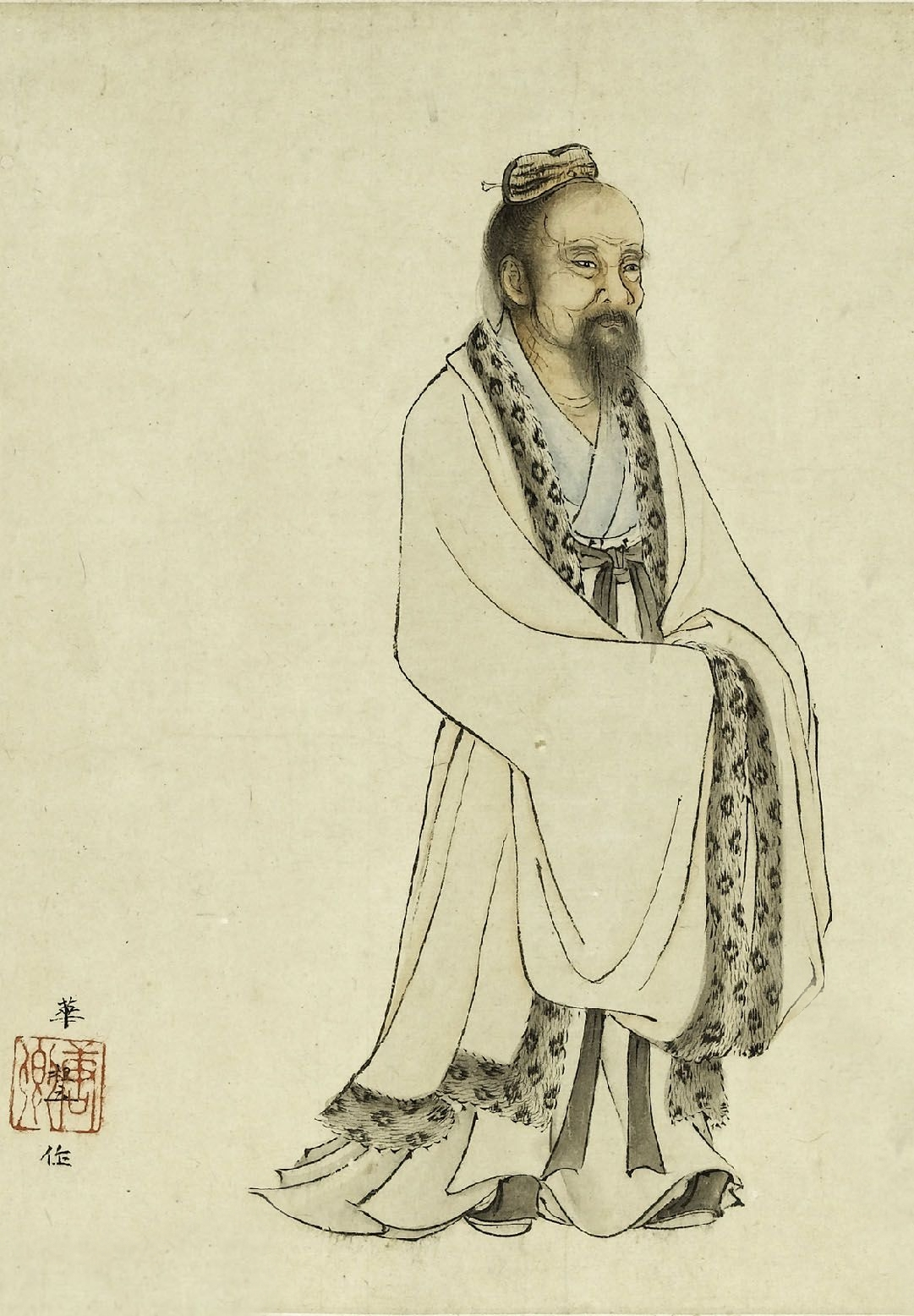 玄門十子圖 莊子